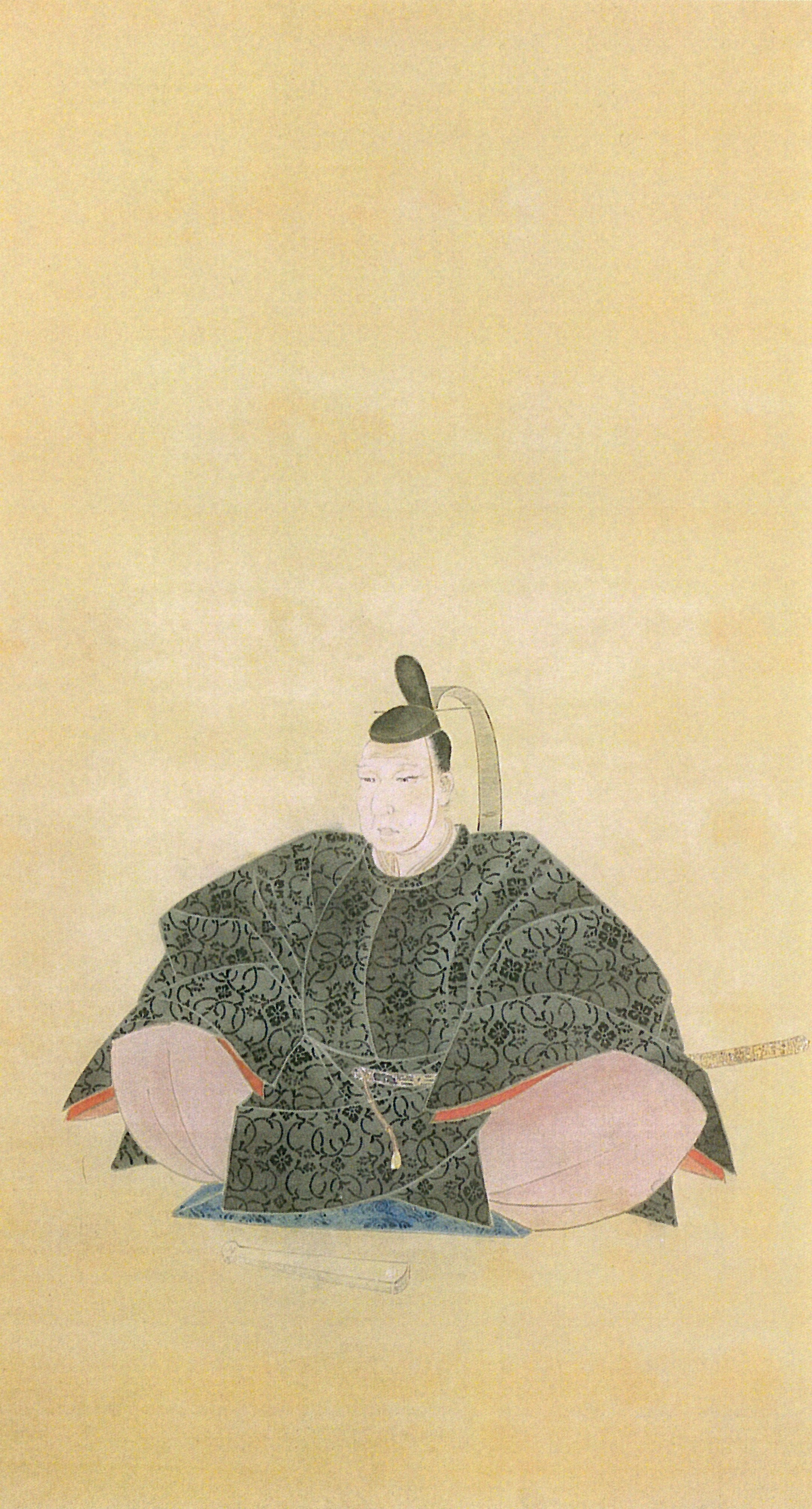 安藤信友の肖像。